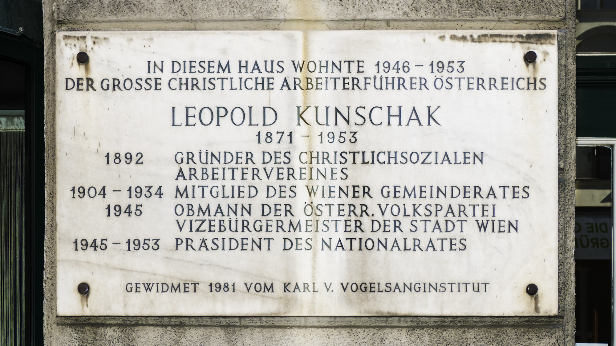 Gedenktafel für Leopold Kunschak am Haus Hernalser Hauptstraße 54 in Wien 17